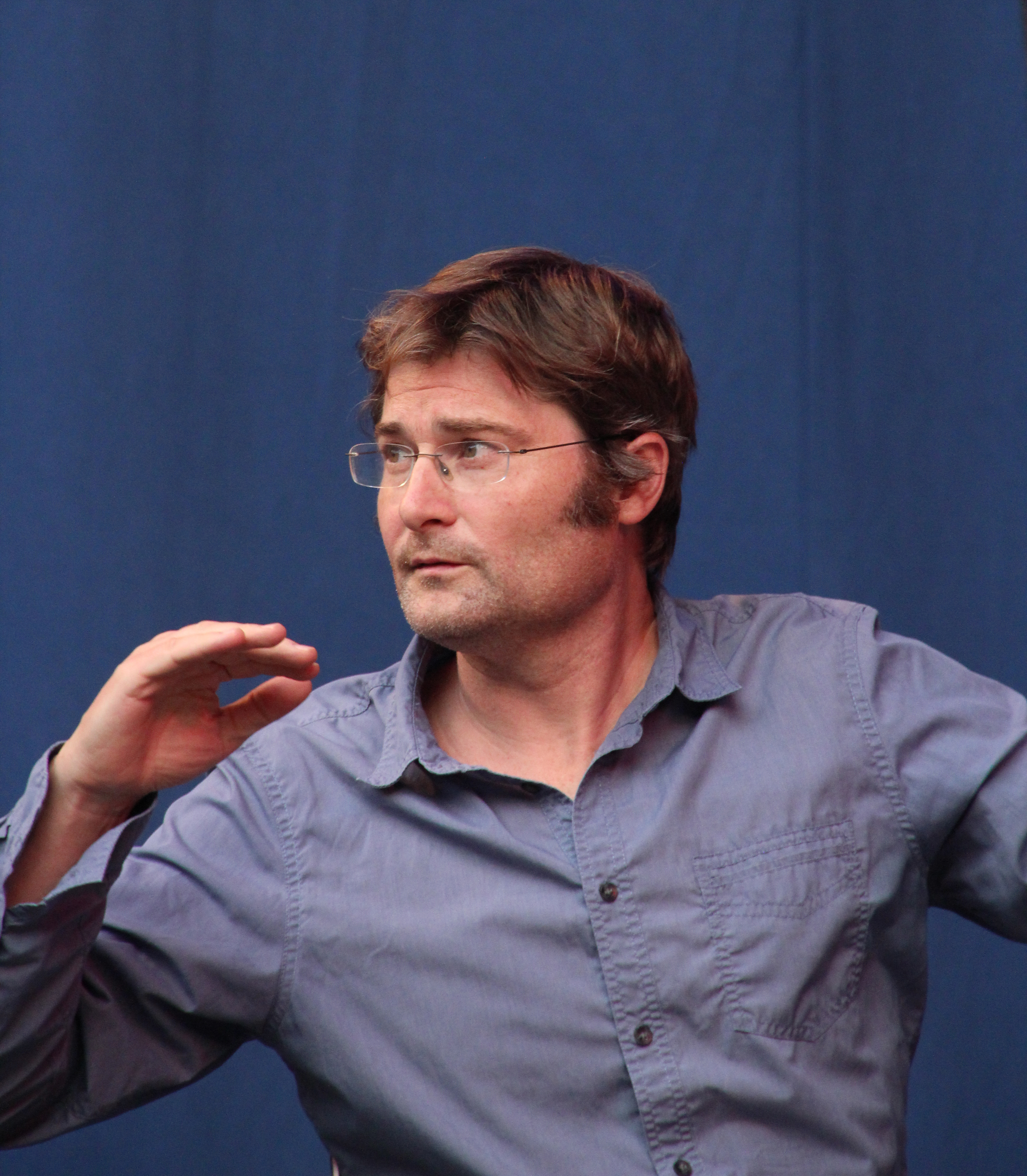 Bildinhalt: Valentín Garvie bei einem Auftritt im Frankfurter Palmengarten Aufnahmeort: Frankfurt am Main, Deutschland Die dargestellte Person wurde bei einem öffentlichen Auftritt fotografiert.